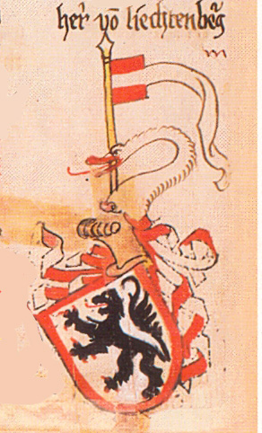 Ingeram-Codex der ehemaligen Bibliothek Cotta herr von liechtenberg freigestellt aus